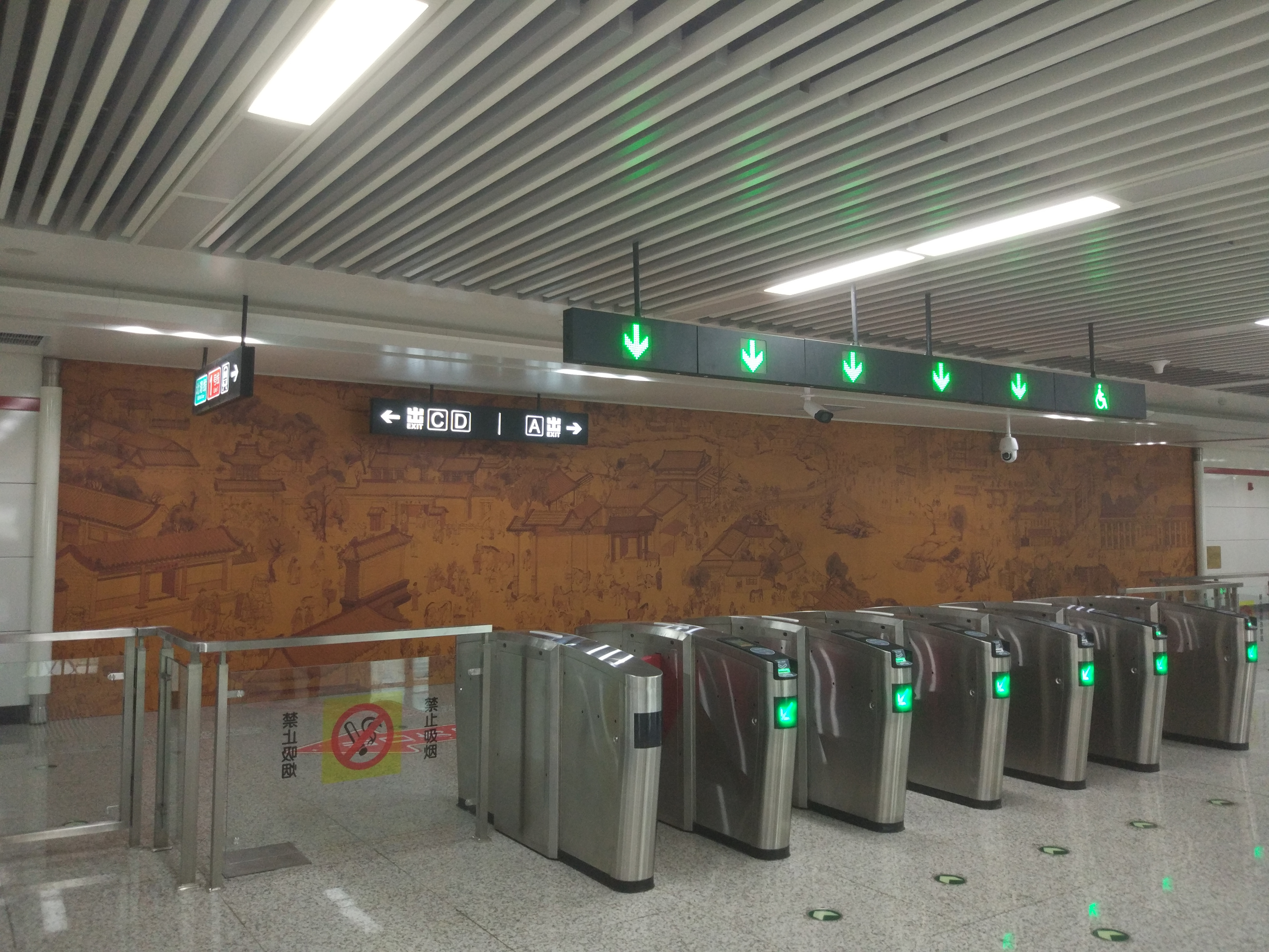 长春地铁北环站壁画